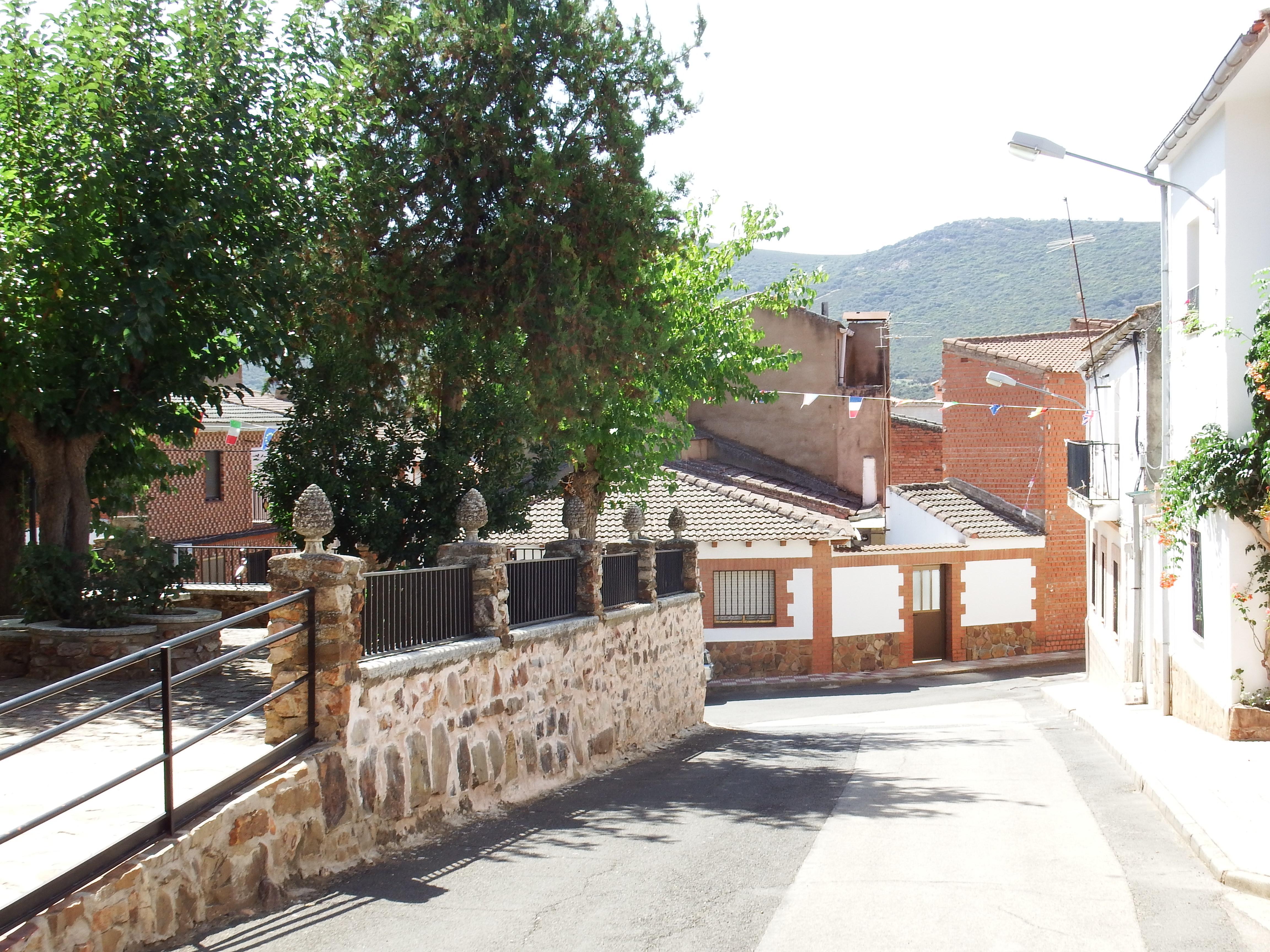 Alcoba de los Montes